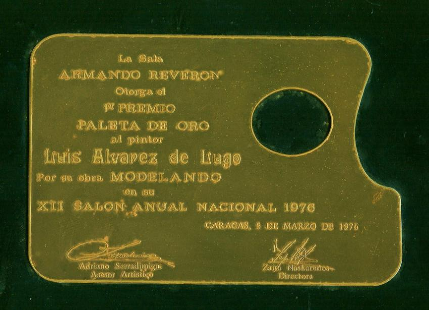 Reconocimiento al pintor Luis Alvarez de Lugo que le otorgó la Paleta de Oro "Sala Armando Reverón"